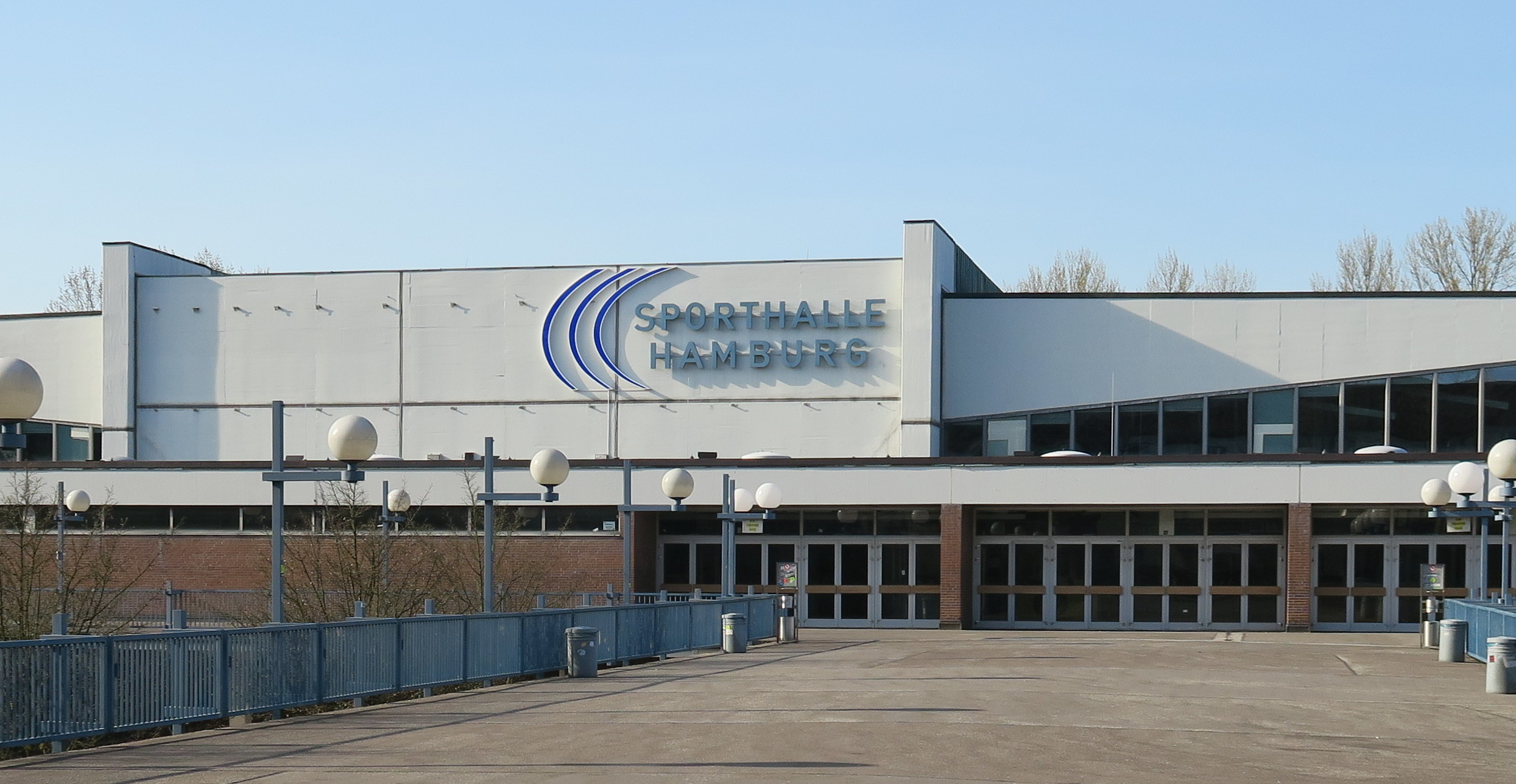 Sporthalle Hamburg (Alsterdorfer Sporthalle) in Hamburg-Winterhude